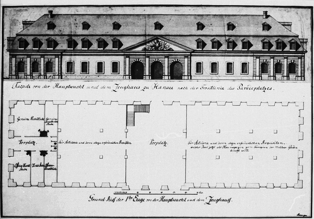 Fassaden- und Grundrissplan des Hanauer Zeughauses am Paradeplatz. Farbige Federzeichnung 60x40 cm. signiert "Heerwagen"